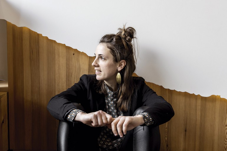 Garazi Lizarraga Lertxundi (2020)